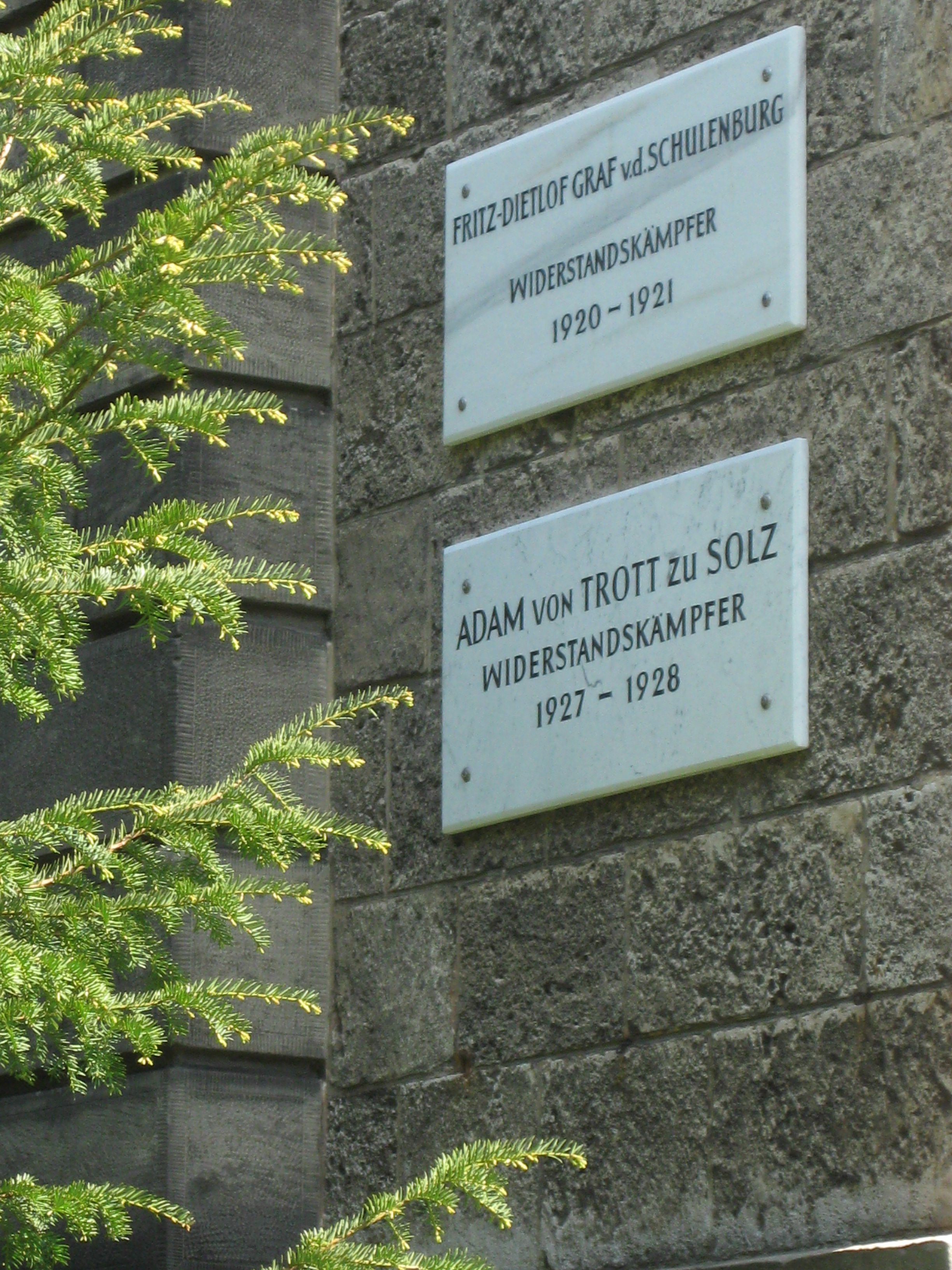 Göttinger Gedenktafeln für die Widerstandskämpfer v.d. Schulenburg und v. Trott zu Solz am ehemaligen Corpshaus des Corps Saxonia Göttingen am Theaterplatz in Göttingen